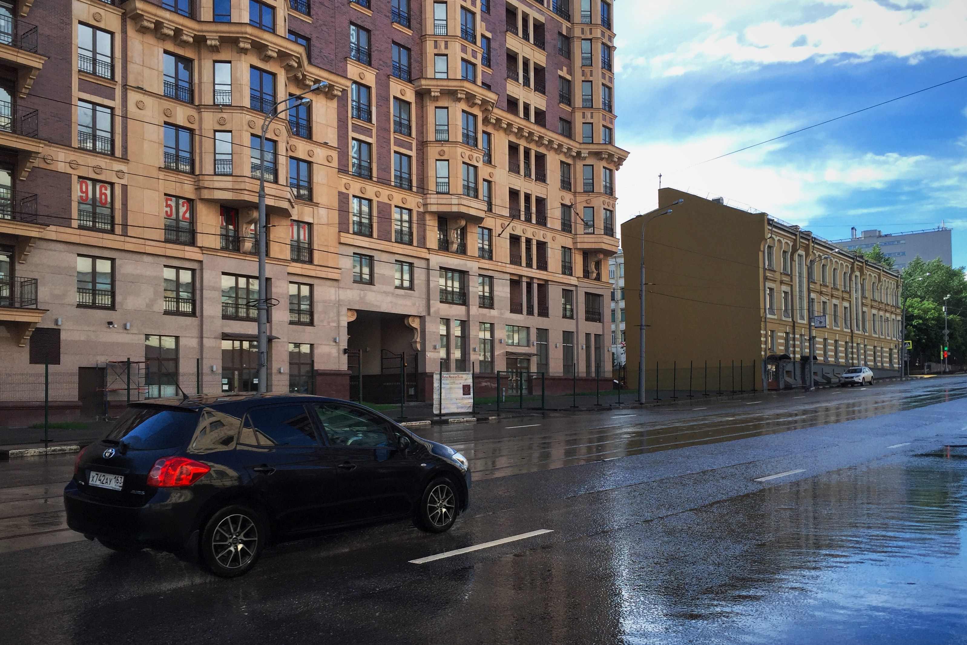 Костомаровский переулок. Новейшая новостройка (по адресу Наставнический 3) и старое здание чопа РЖД (Костомаровский 2).